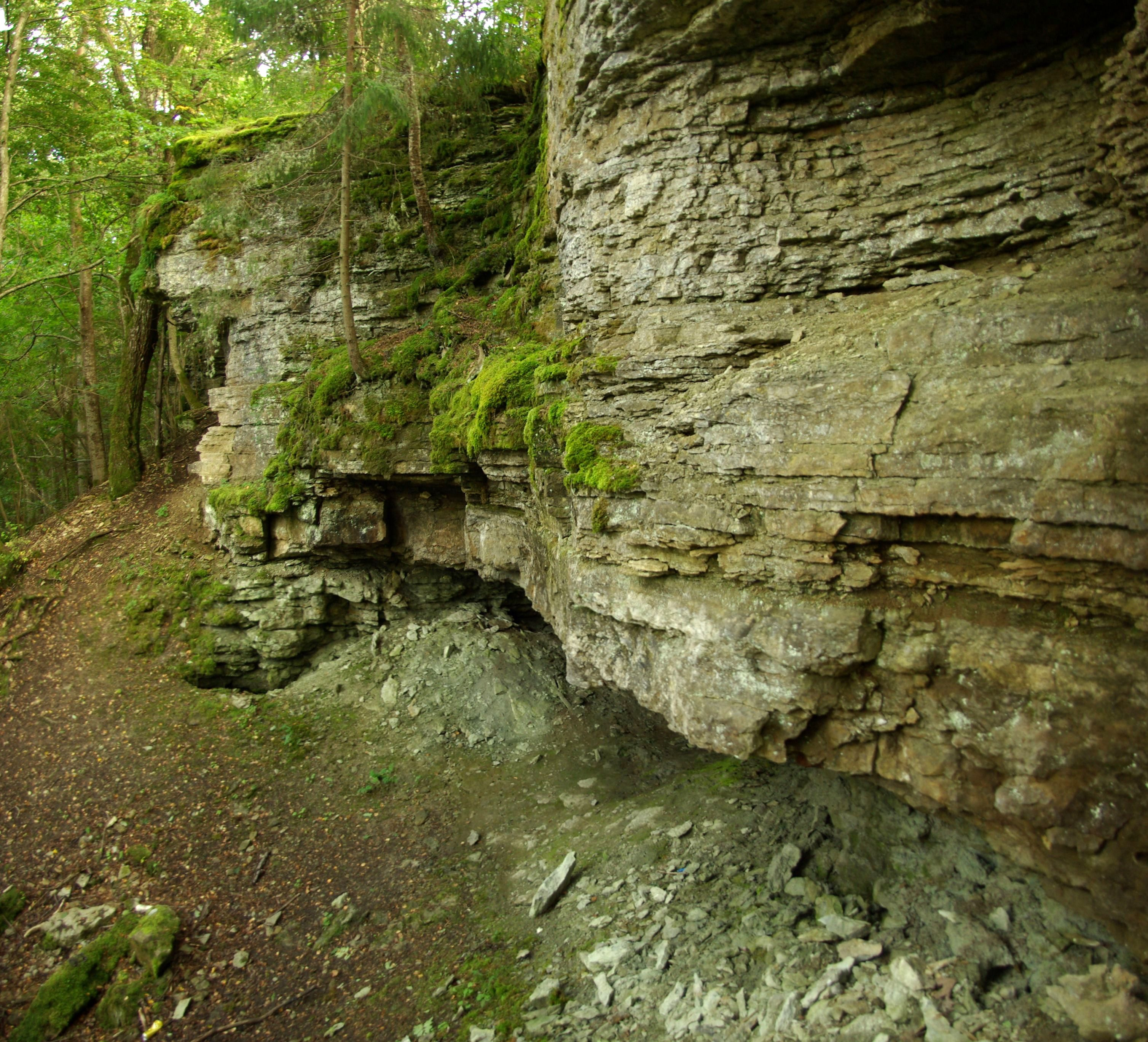 Naage pank asub Naage maastikukaitsealal (4,6 ha, moodustatud 2005. aastal) mis jääb Harju maakonda Harku valda Vääna klindilahe äärde. Kaitseala eesmärgiks on Vääna klindilahe äärse klindiastangu kaitse kõrval ka siinsed nahkhiired.